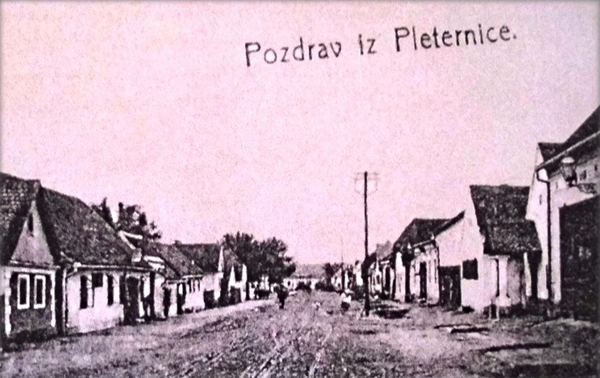 Ulica Ivana Sveara,oko 1920.godine